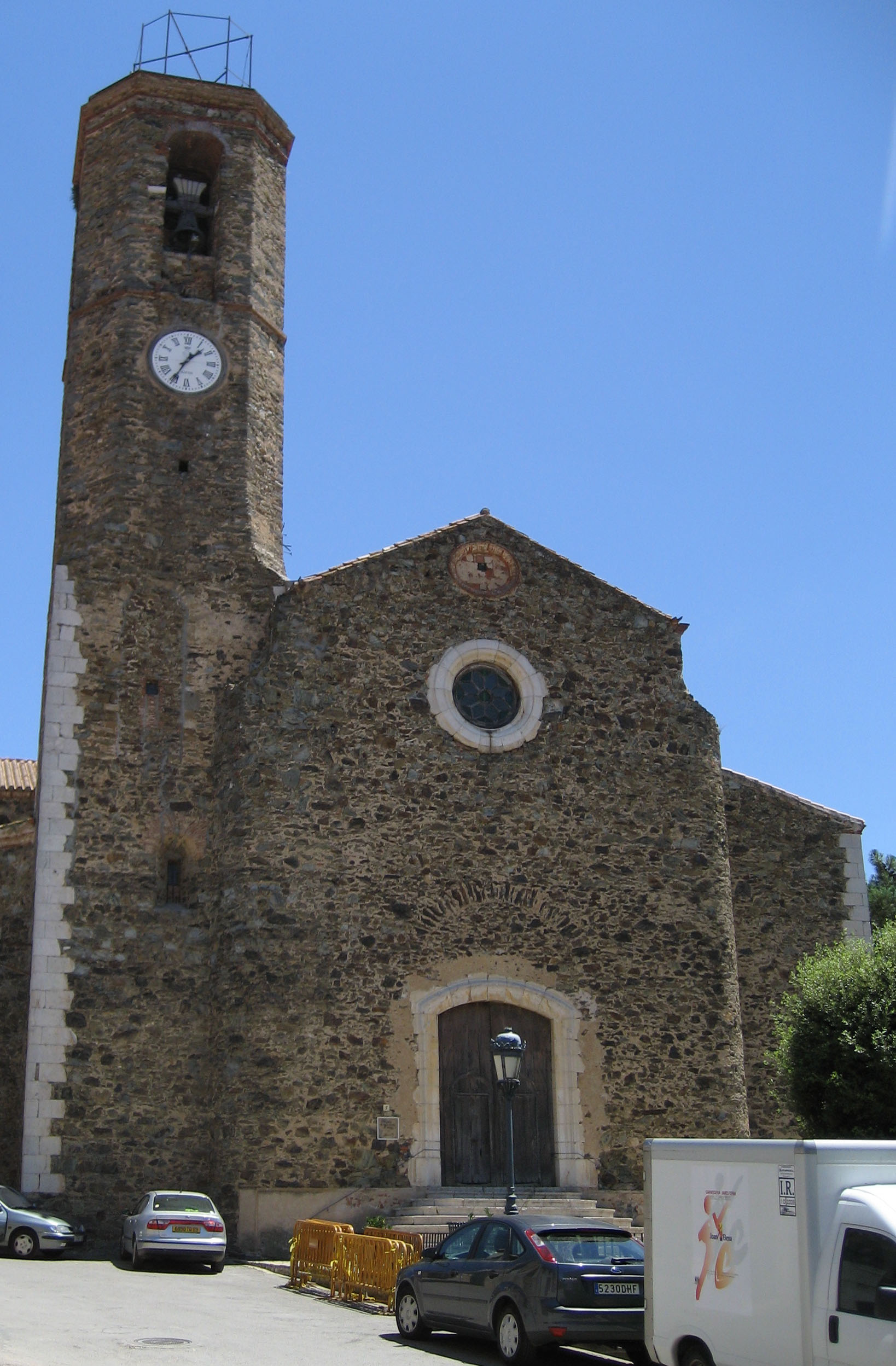 Vista exterior de la iglesia de Santa Eulalia de Noves en Garriguella, Cataluña, España